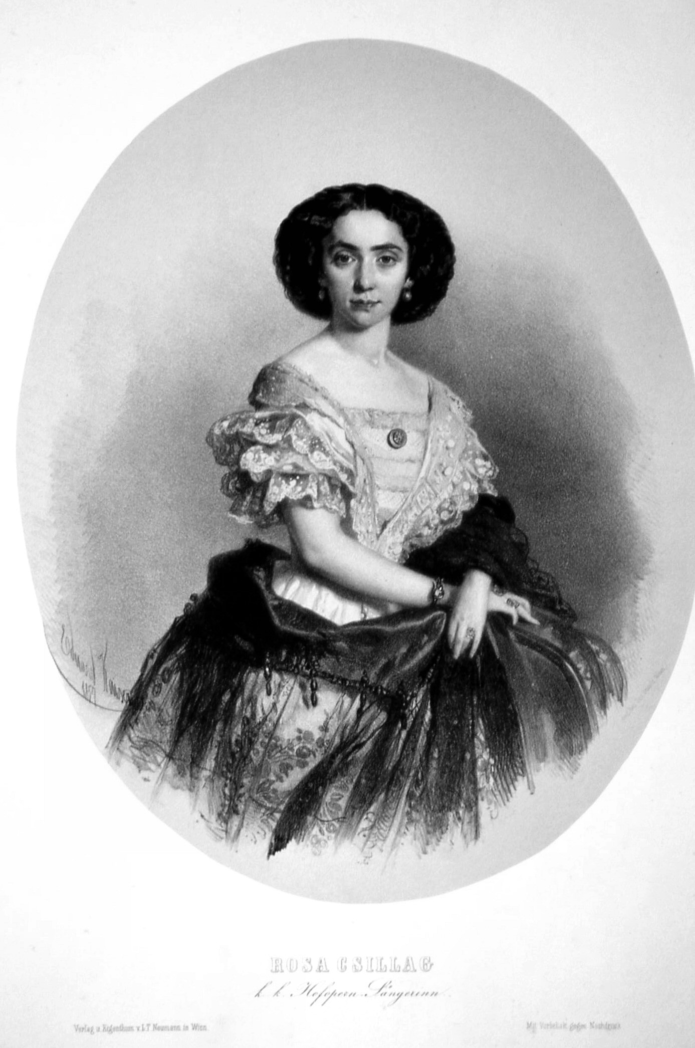 Rosa Csillag (1832–1892), österreichisch-ungarische Opernsängerin; Lithographie von Eduard Kaiser, 1857